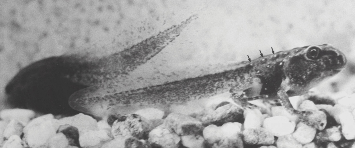 Discoglossus montalentii – Kaulquappe